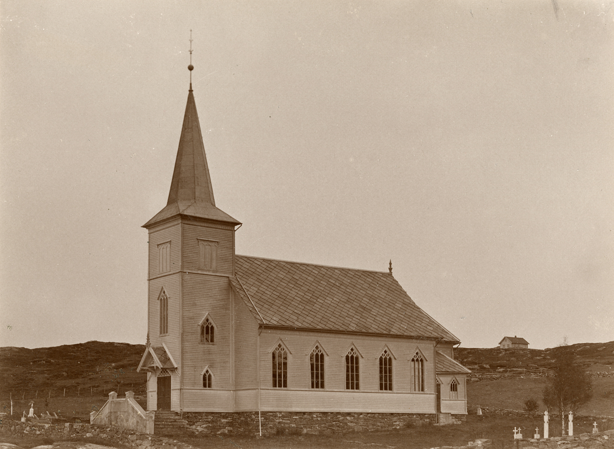 Austevoll kirke. Foto: Christian Christensen Thomhav, fra Kulturminnebilder.no.